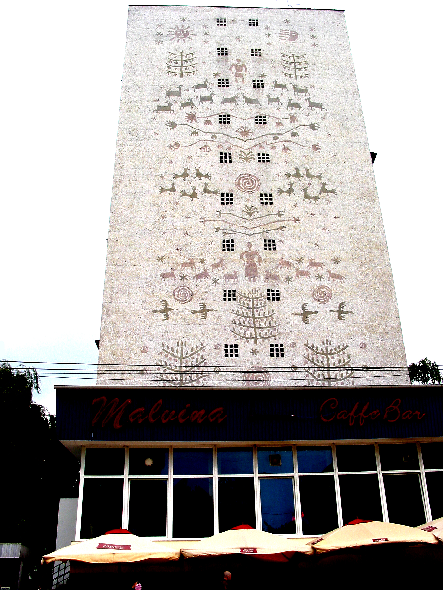 Márványmozaik a tízemeletes épület homlokzatán, Szucsáva, Románia